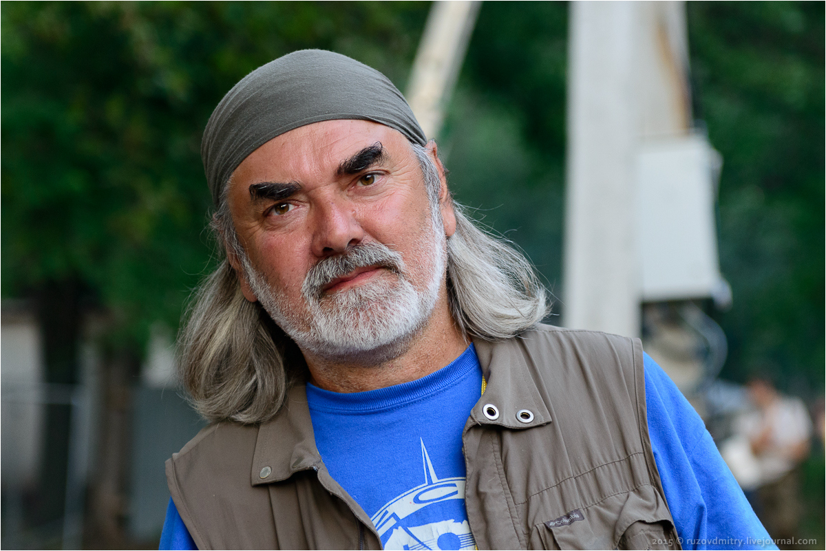 Дмитрий Бикчентаев, Грушинский фестиваль 2015